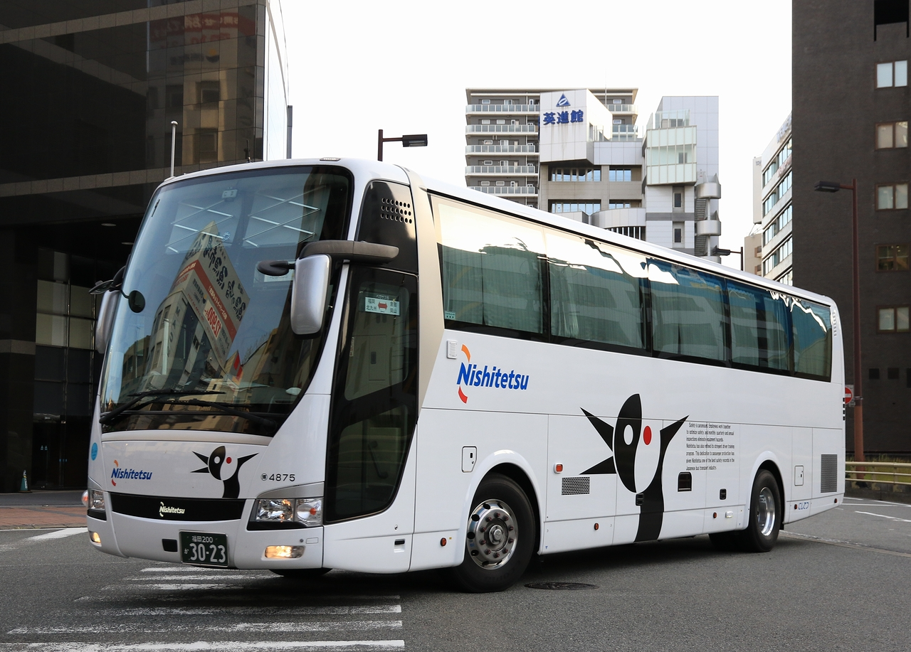 登録番号 福岡200か30-23 車番：4875 西日本鉄道㈱博多自動車営業所所属 夜行高速用車両 2015年9月 福岡市中央区にて撮影 撮影者 Zondag2000